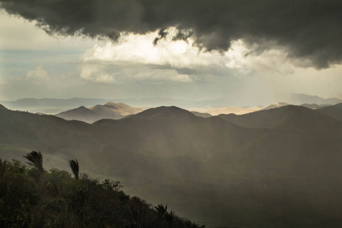 Essa foto foi feita na região de Tianguá, cidade que fica na chapada Ibiapaba, Ceará. Uma Chuva com um lindo pôr do sol no horizonte.